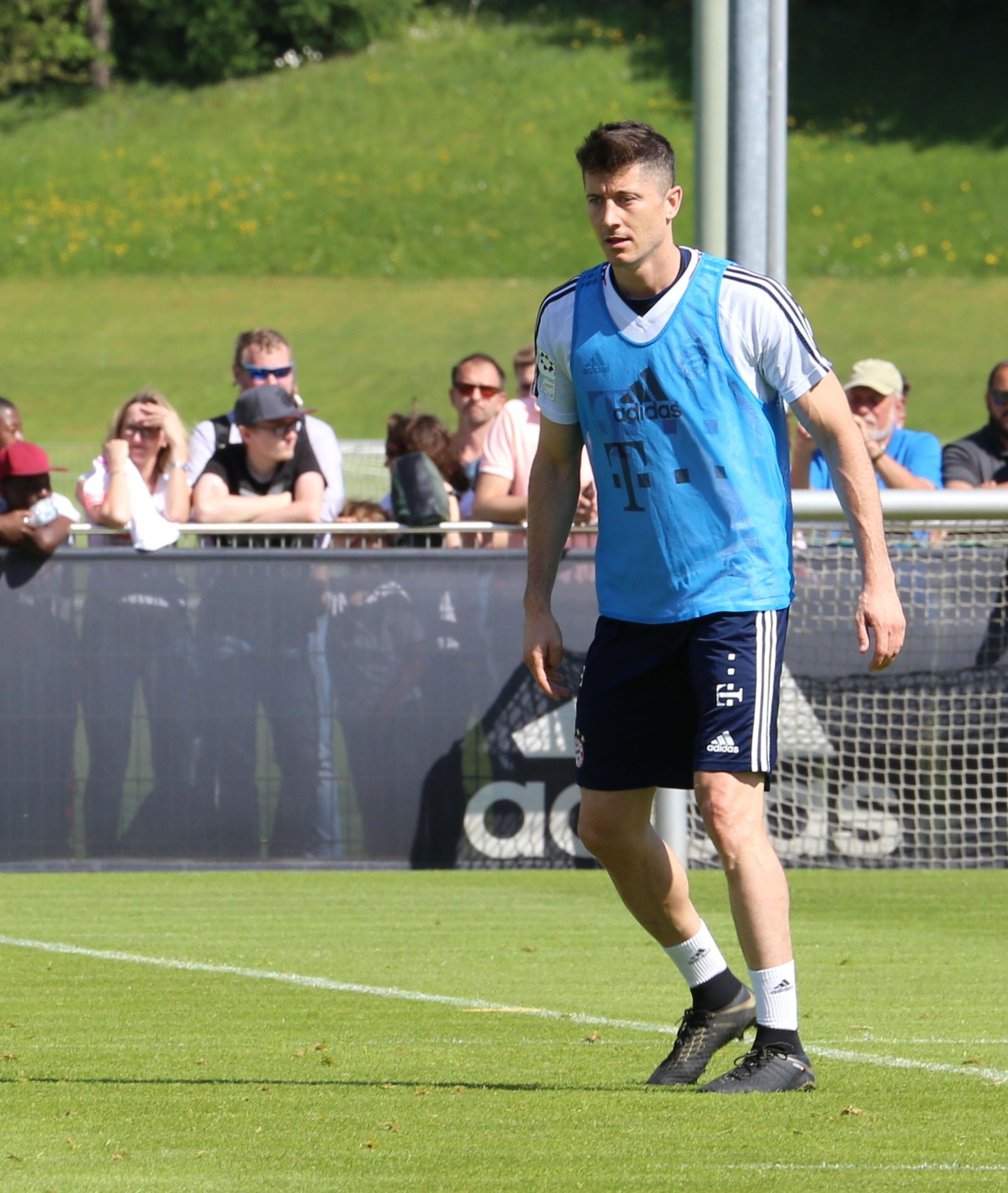 Robert Lewandowski, am 8. Mai 2018 beim Training auf dem Gelände des FC Bayern München